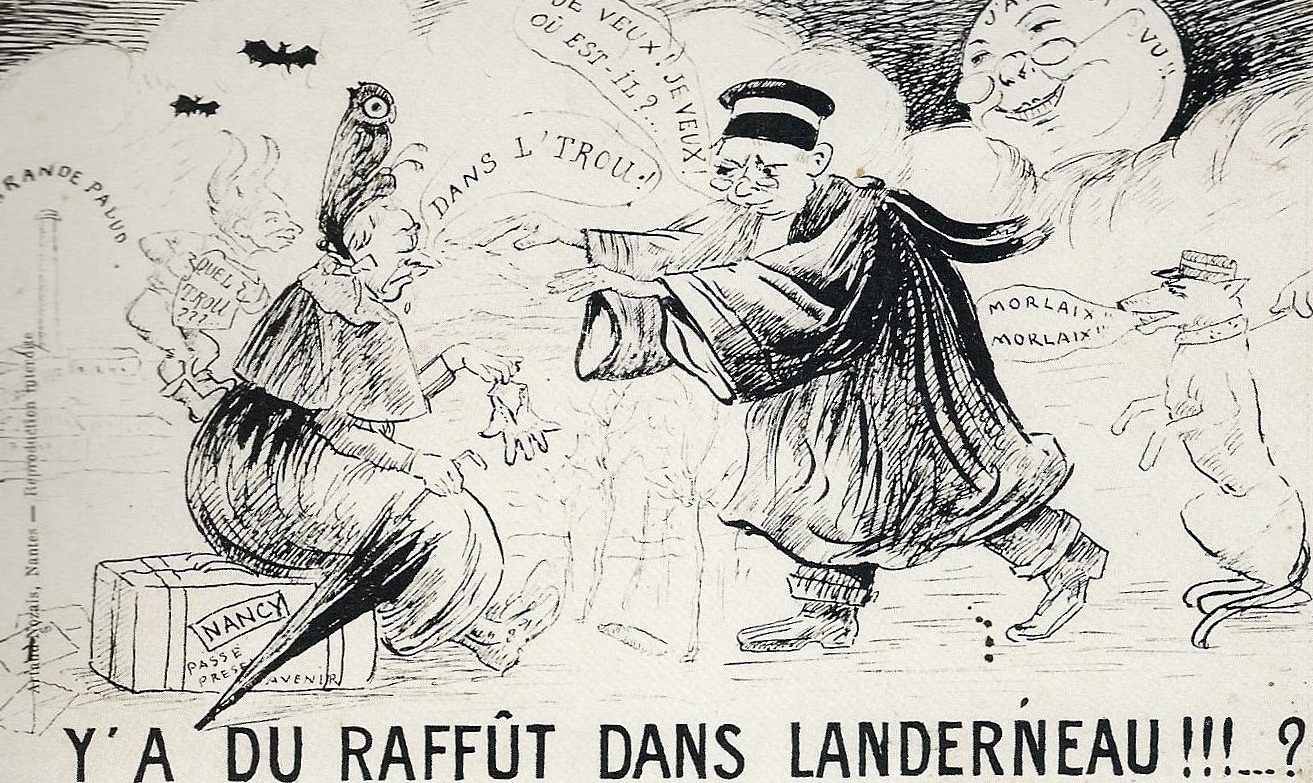 "Y'a du raffût dans Landerneau" (carte postale humoristique d'Artaud et Nozais, vers 1910)